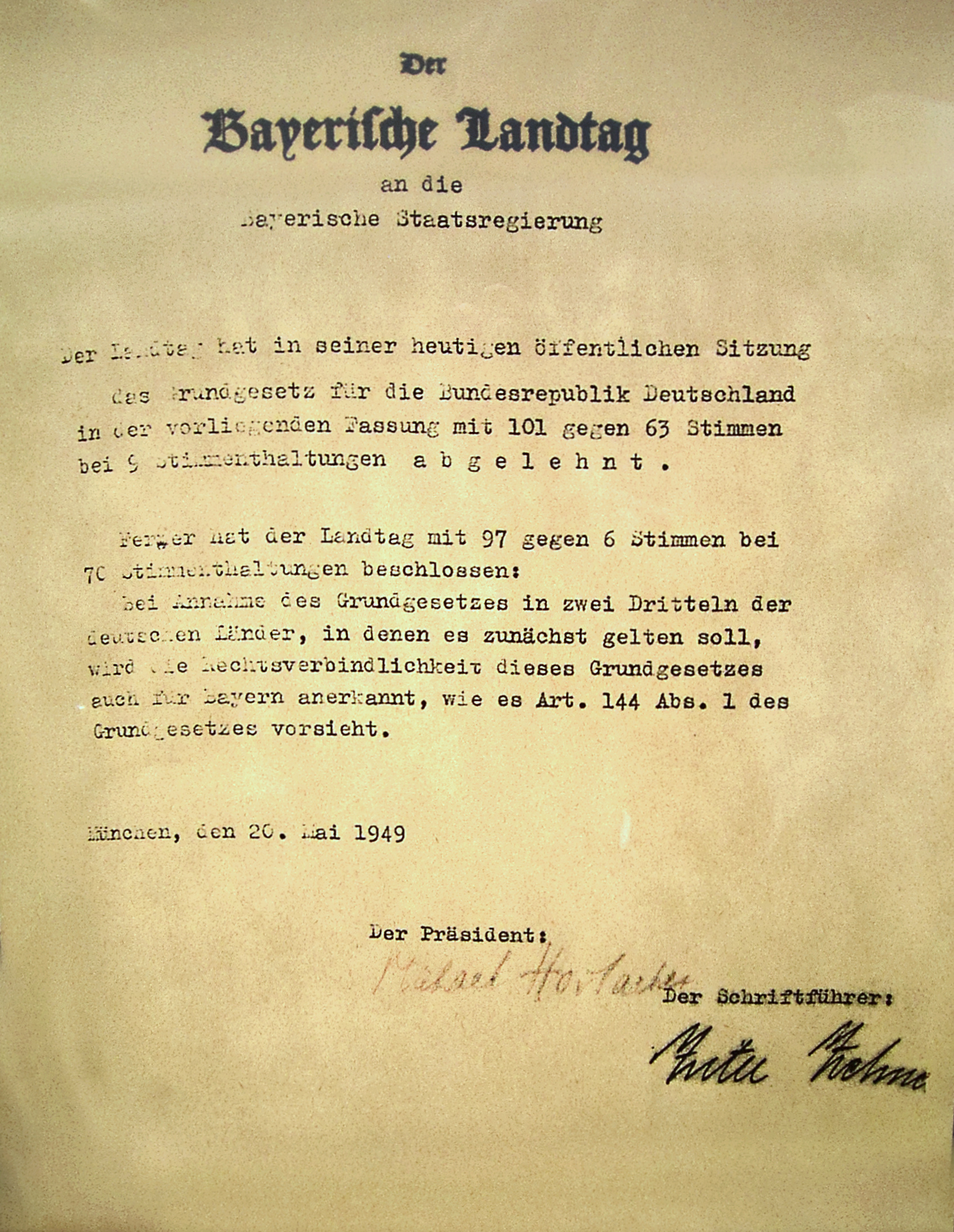 Mitteilung des Bayrischen Landtages an die Staatsregierung über die Ablehnung des Grundgesetzes und gleichzeitige Anerkennung der Rechtsgültigkeit bei mehr Ratifizierung durch 2 Drittel der Länder. (20. Mai 1949)